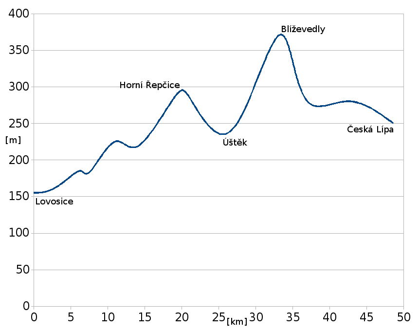 Profil trati 087 z Lovosic do České Lípy